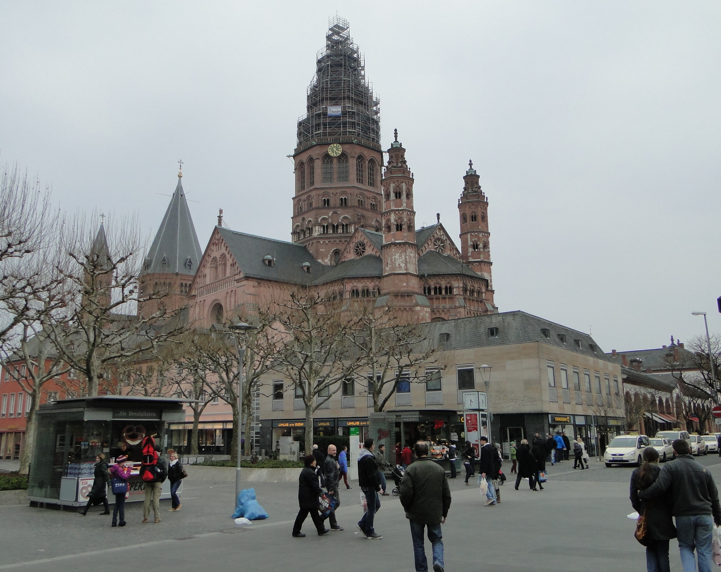 Mainz 29.03.2013